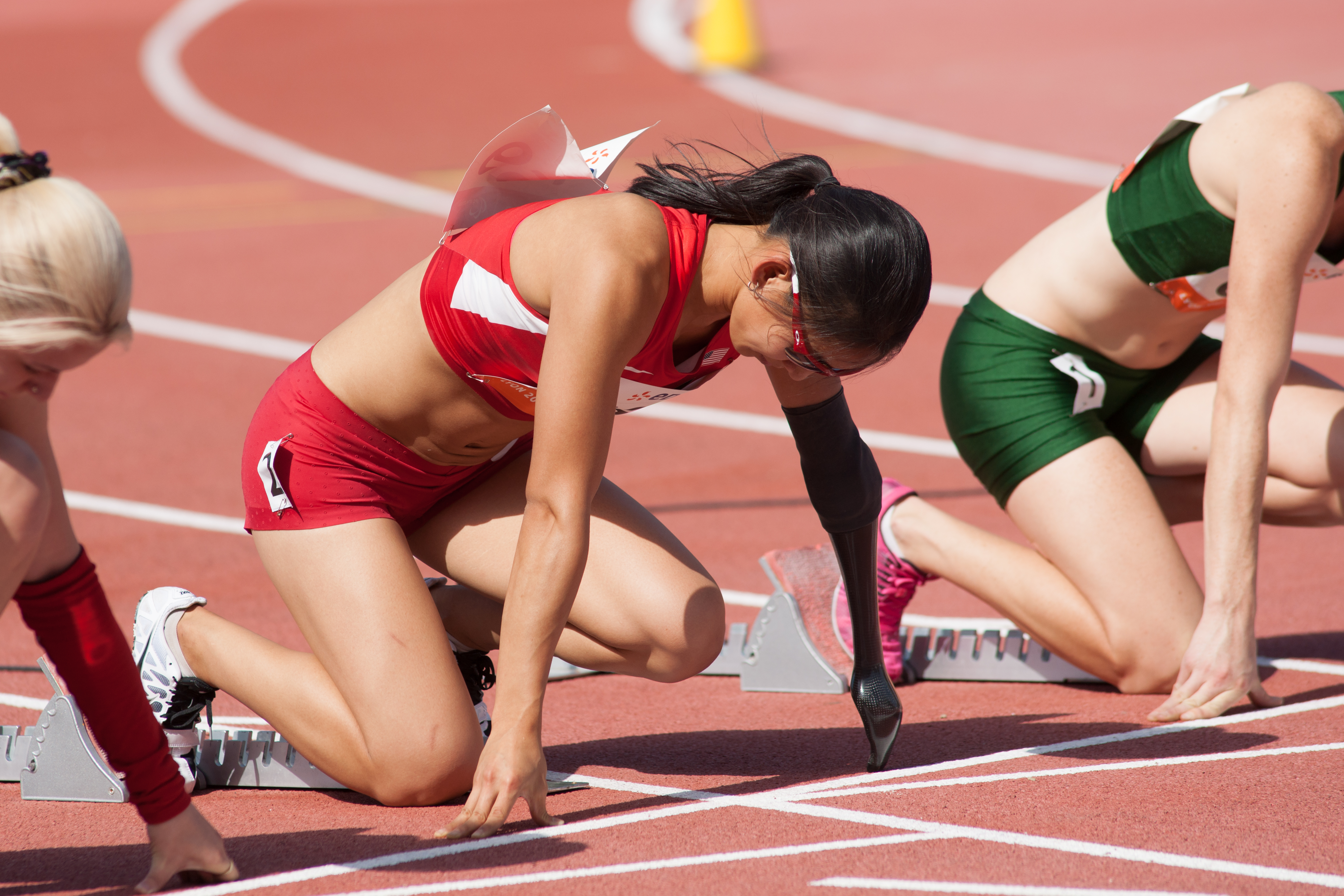 100 mètres femmes T46.